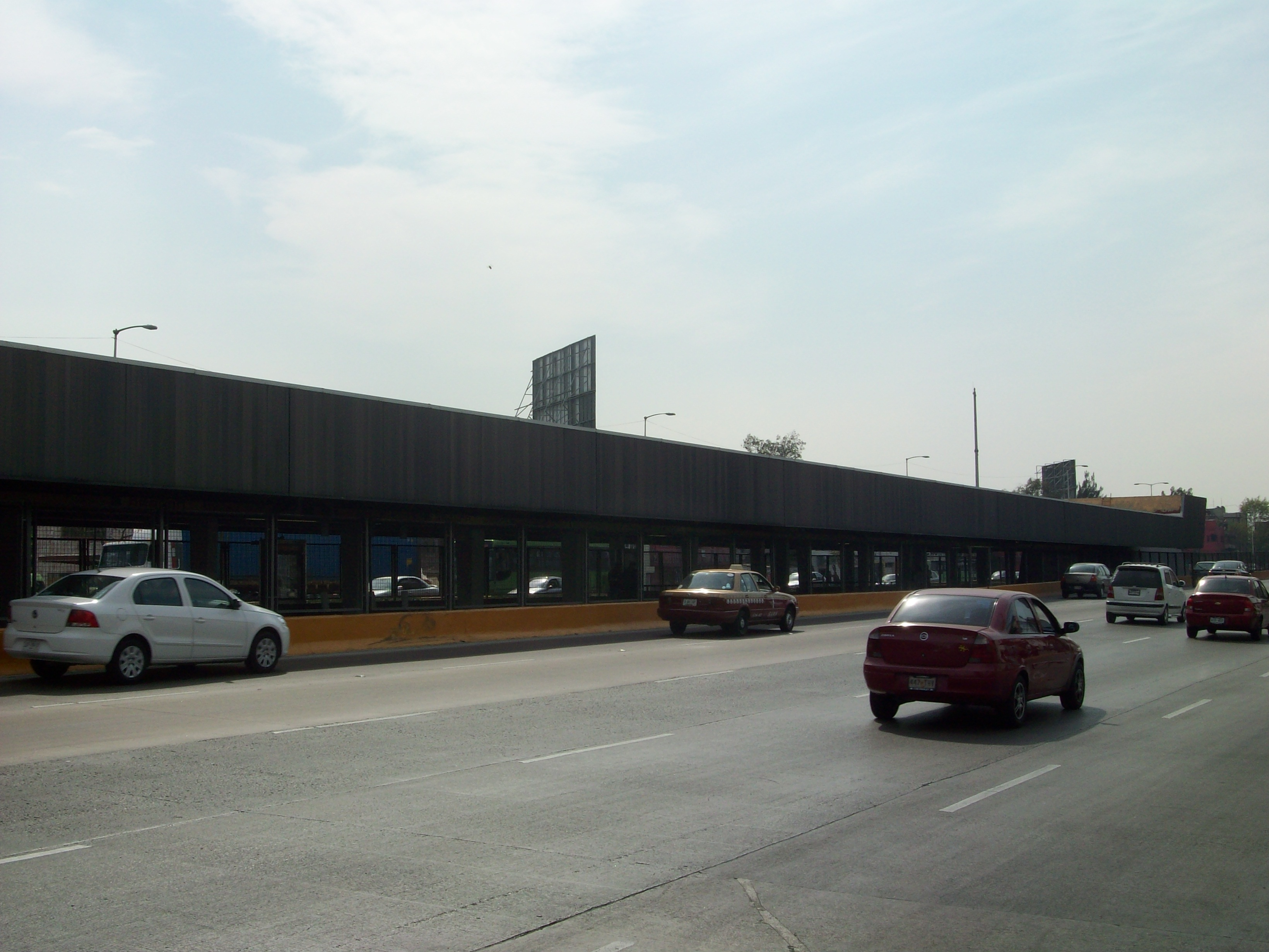 Edificio estacion Aragon